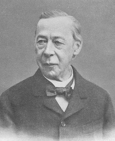 Eduard Woelfflin